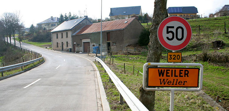 Sujet:Weiler an der Gemeng Pëtscht "Source:ex.Commons:Foto vum en.User:Hendrikweiler mol e bësse geriicht an ugestrach vum User:Croischong Lizenz